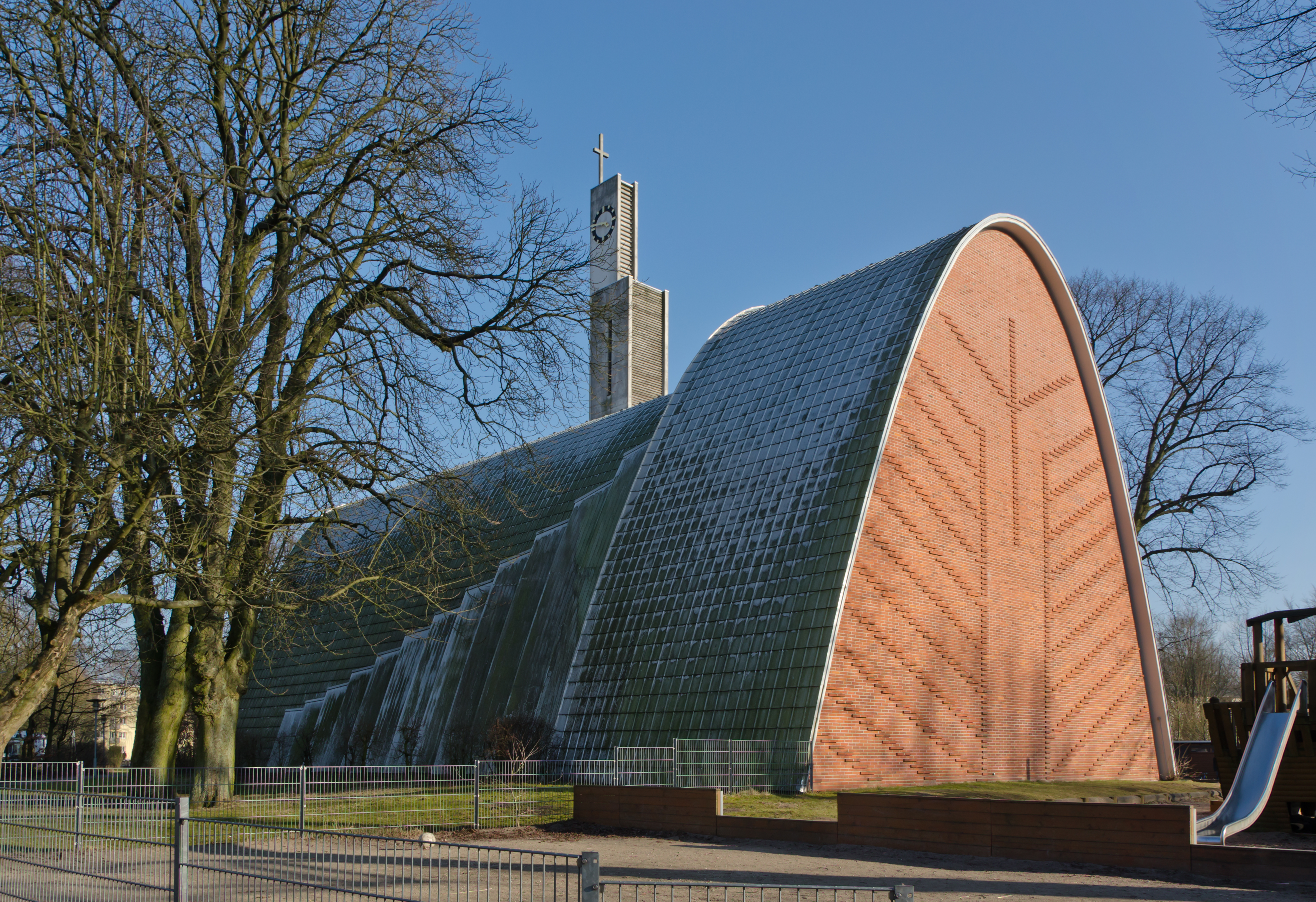 Erlöserkirche von Nordwesten